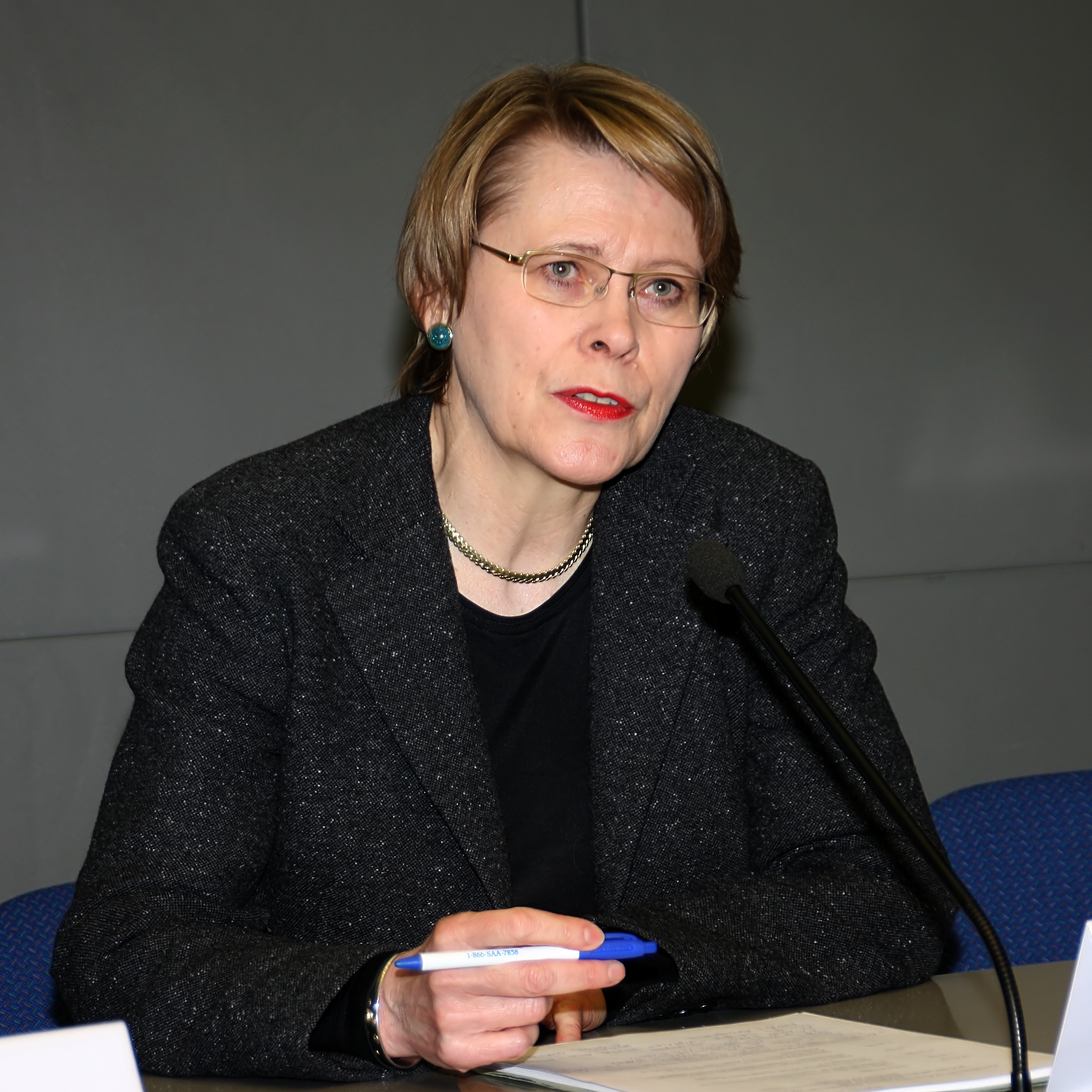 Pressekonferenz vom Bundesarchiv und Wikimedia Deutschland zur Bekanntgabe der Kooperation/Bilderspende. Prof. Dr. Angelika Menne-Haritz (Vizepräsidentin des Bundesarchivs).